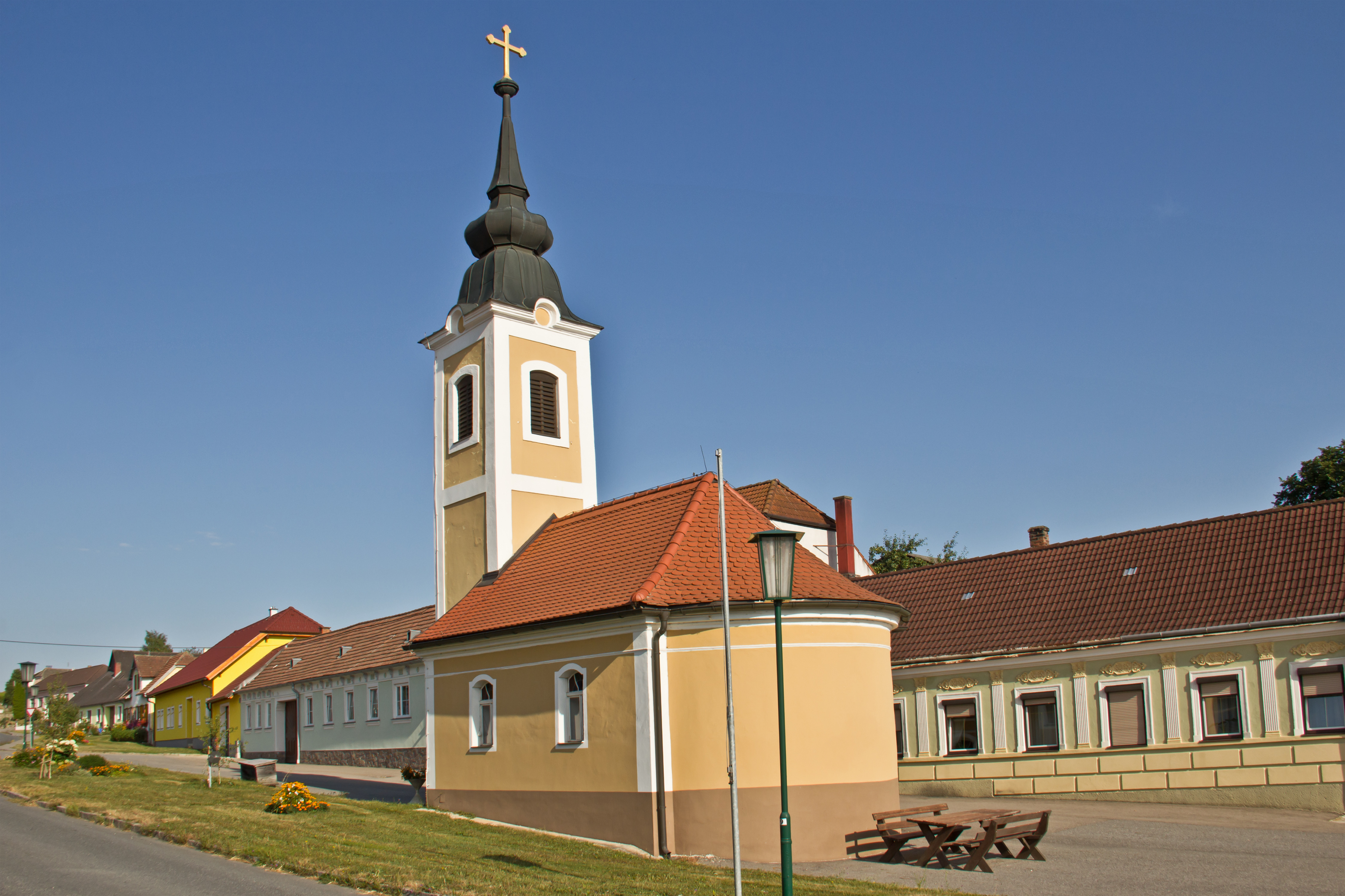 Ortskapelle Mariae Himmelfahrt in Seebs